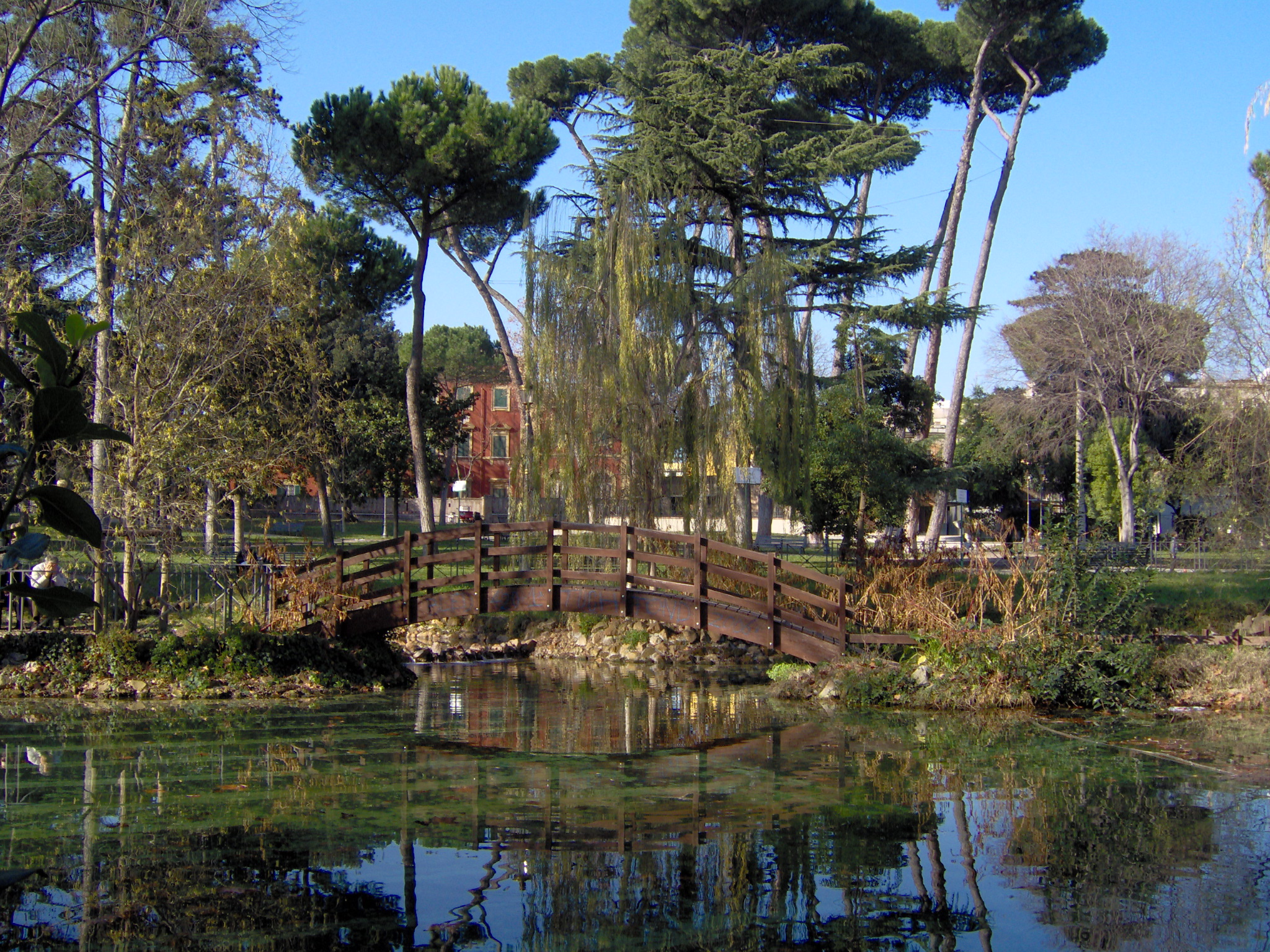 laghetto villa paganini